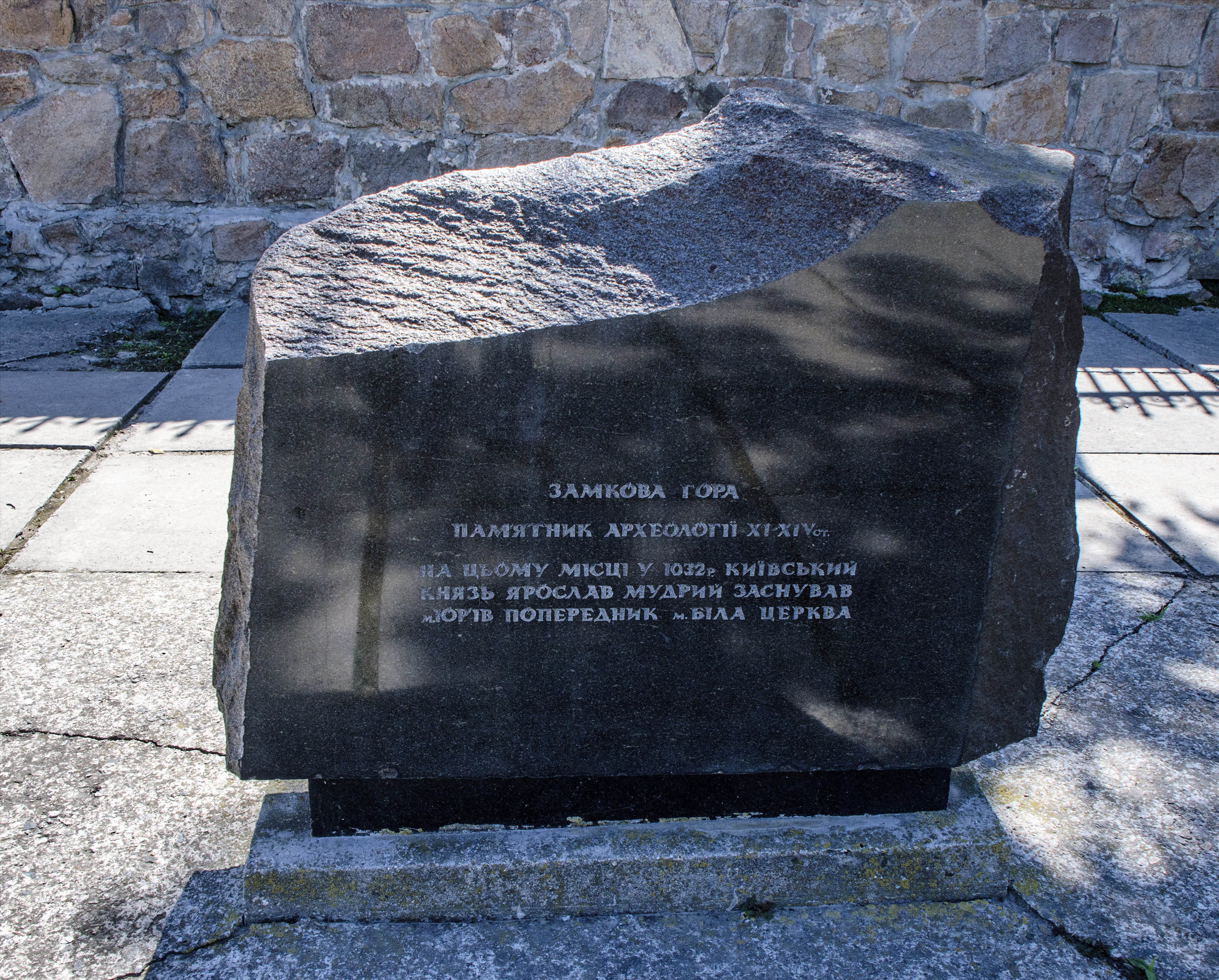 Городище літописного міста Юр'єва, Біла Церква, Замкова гора